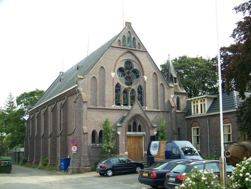 Sint Martinuskerk, Foxham, gemeente Hoogezand-Sappemeer (NL)